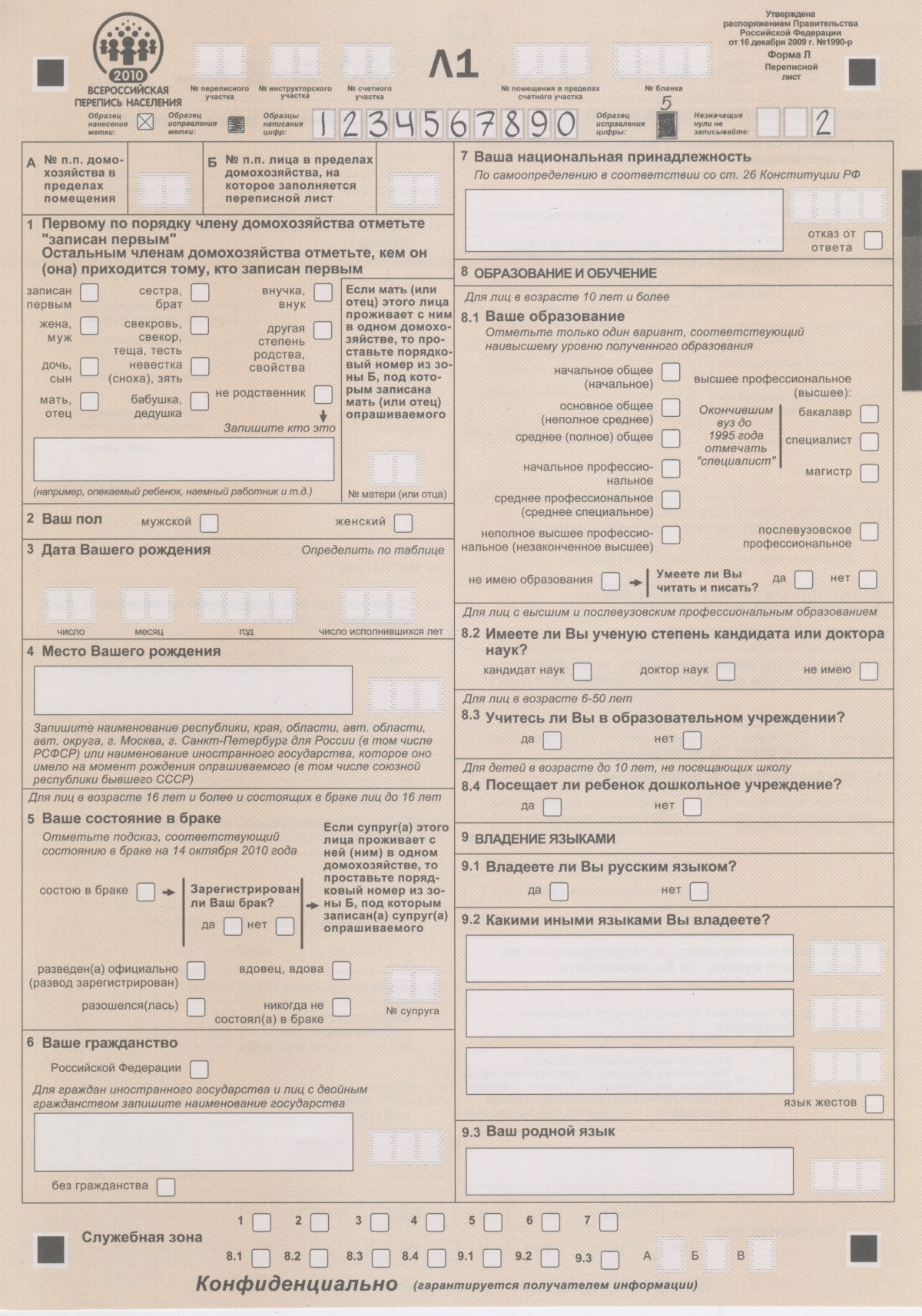 Форма Л «Переписной лист» (для всех лиц). Лицевая сторона